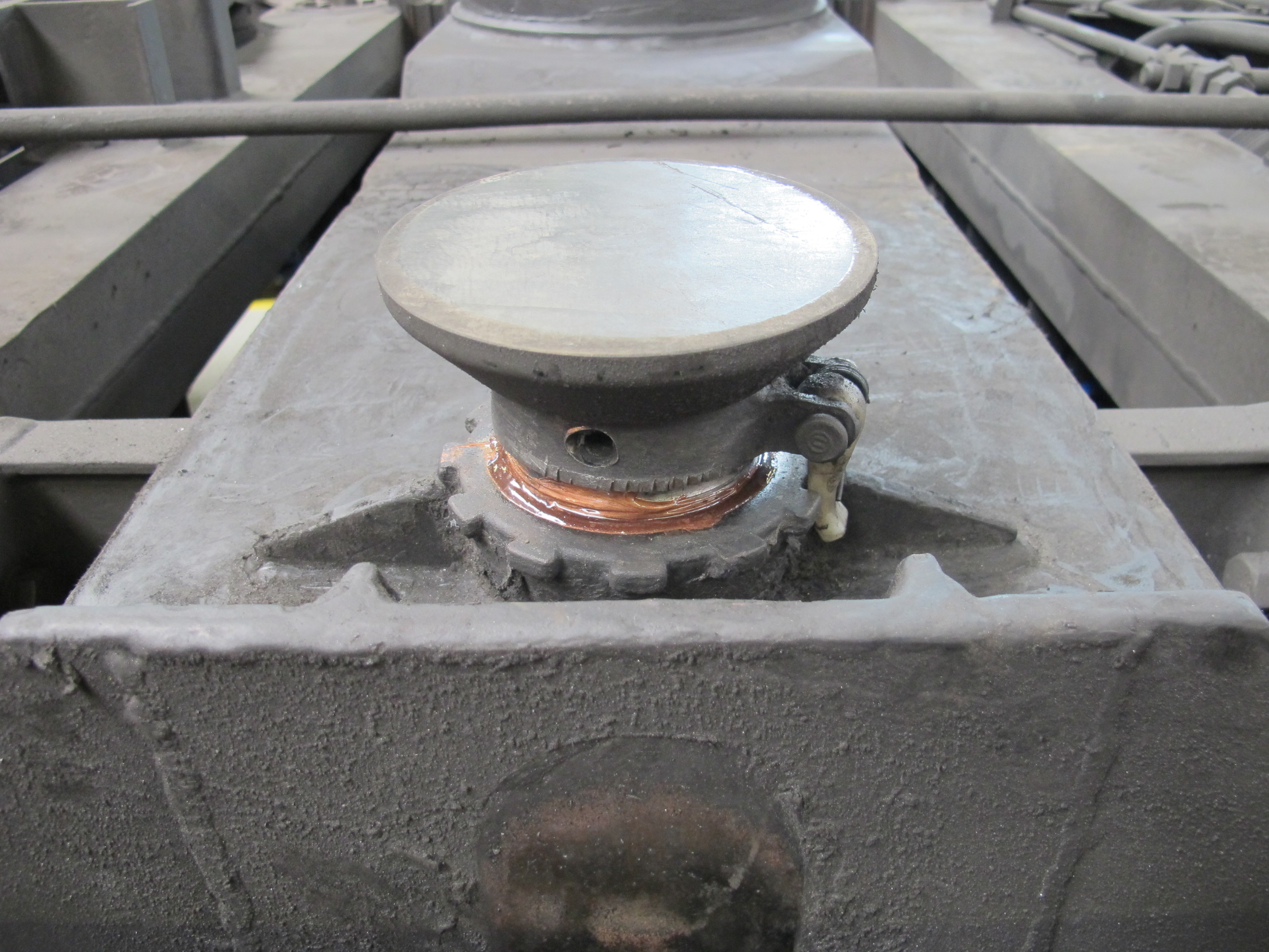 Drehgestell mit Gleitstück